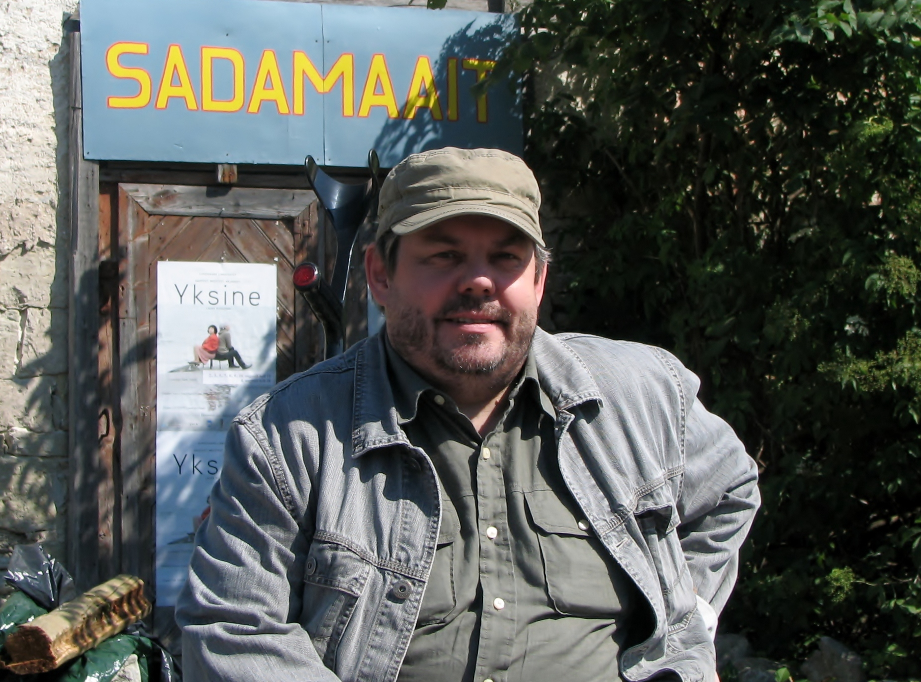 Aare Toikka vahetult enne etenduse proovi Kuressaare Sadamaaida ees